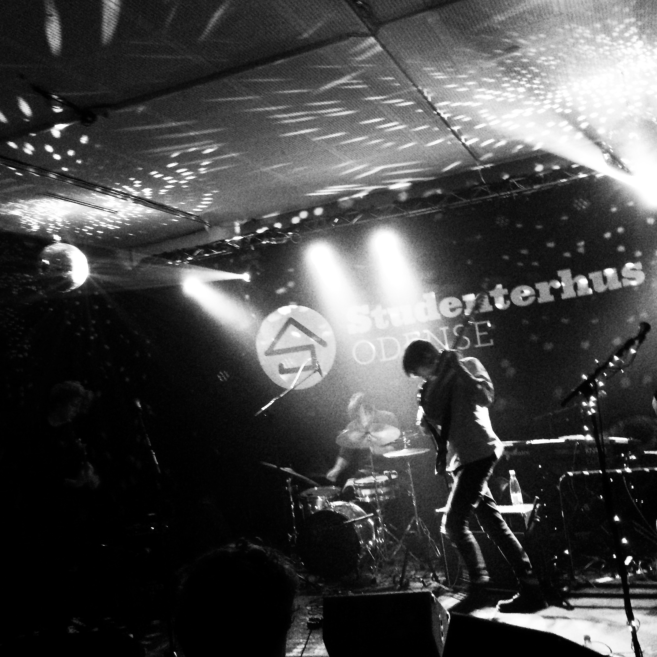 Koncert på Studenterhus Odense december 2014